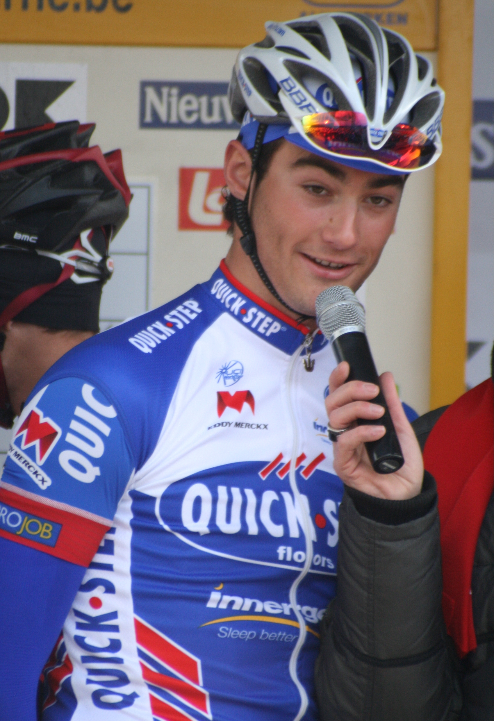 Kuurne-Bruxelles-Kuurne 2011, Guillaume Van Keirsbulck